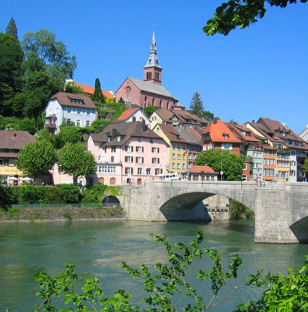 Das deutsche Laufenburg von der Schweizer Seite fotographiert im Mai 2004